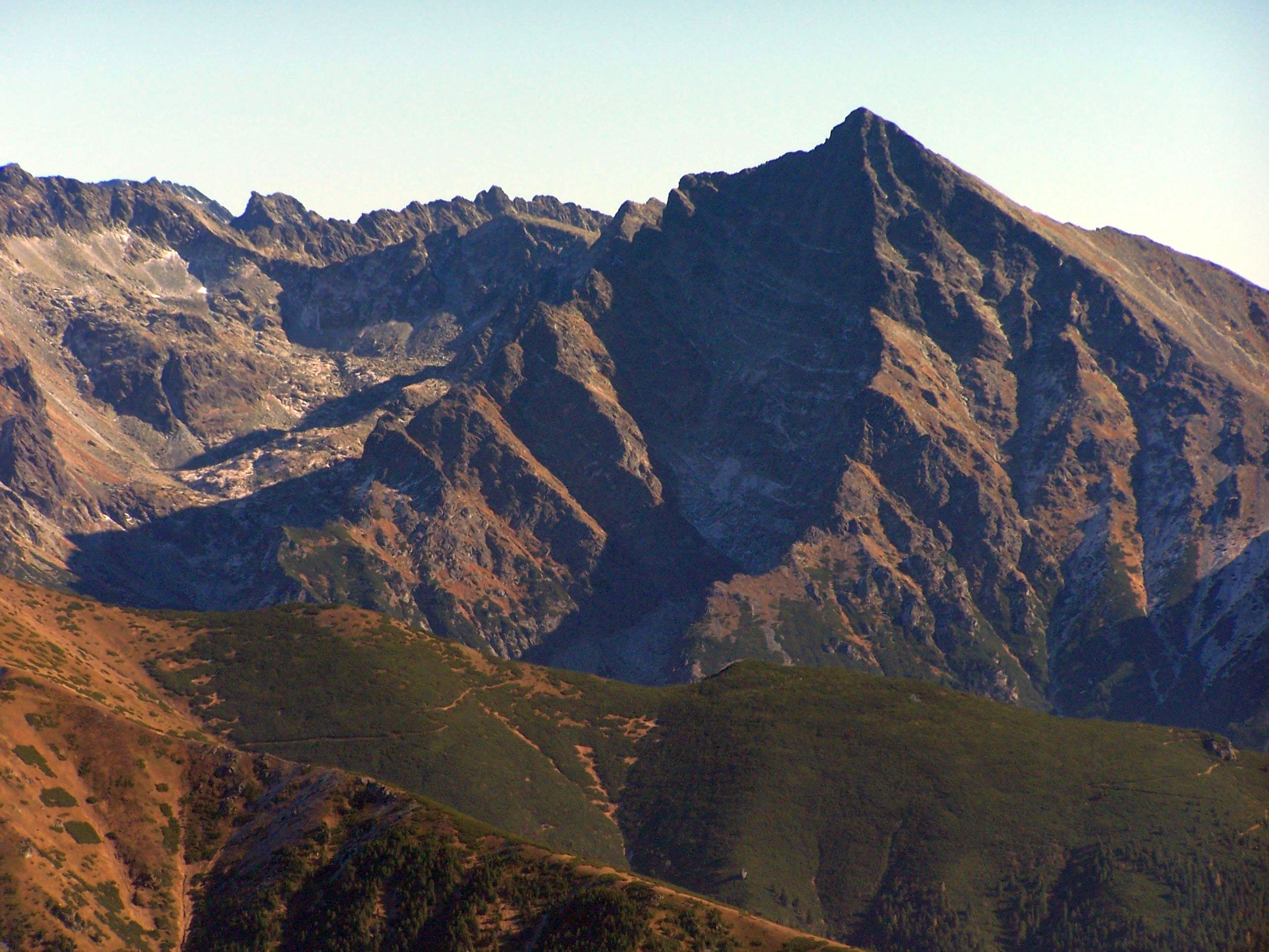 Widok na Krywań z Błyszcza. Na dole Dolina Krzyżna i w Wszywaki